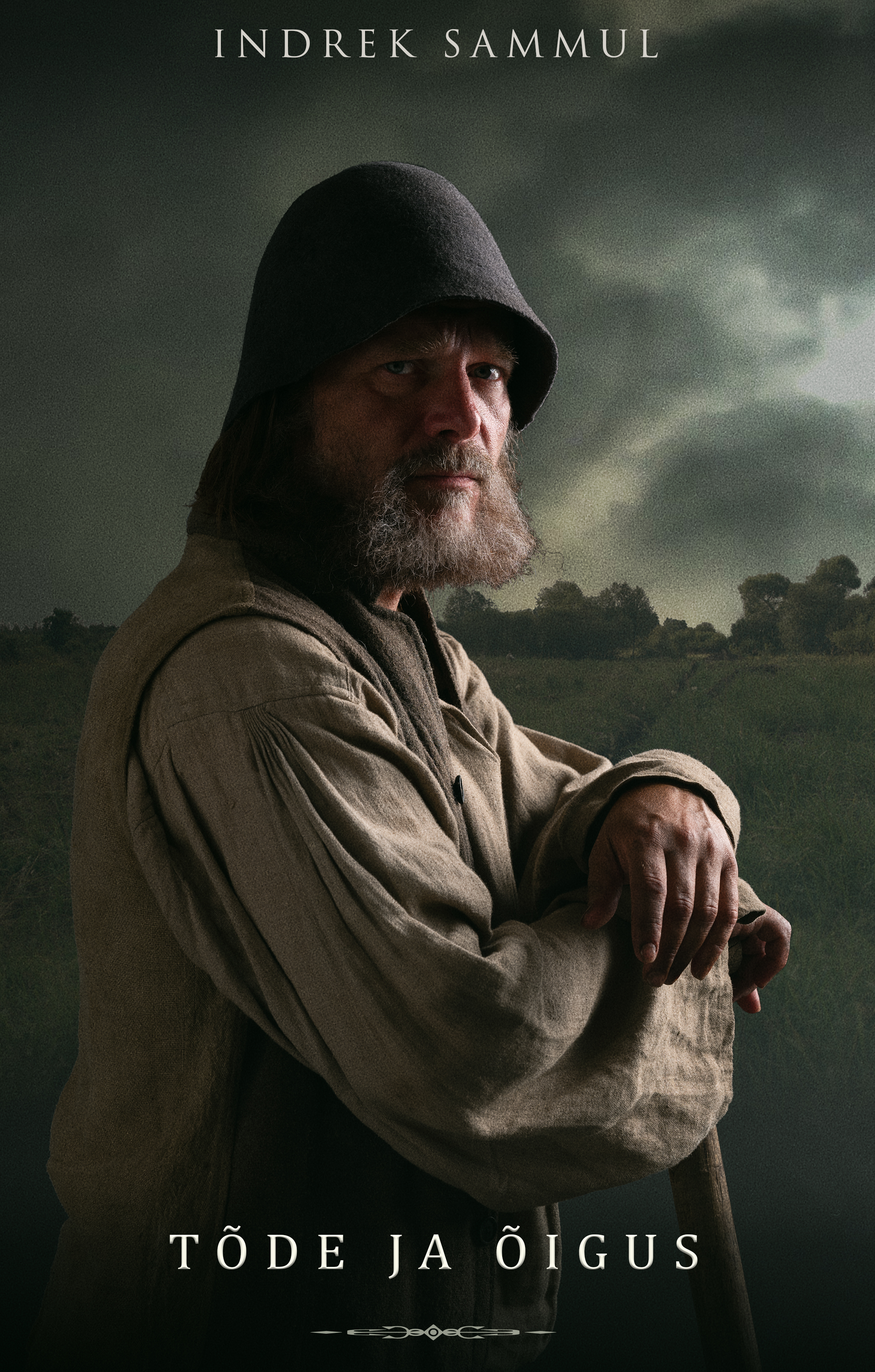 Indrek Sammul filmis "Tõde ja õigus" Sauna-Madise osatäitjana